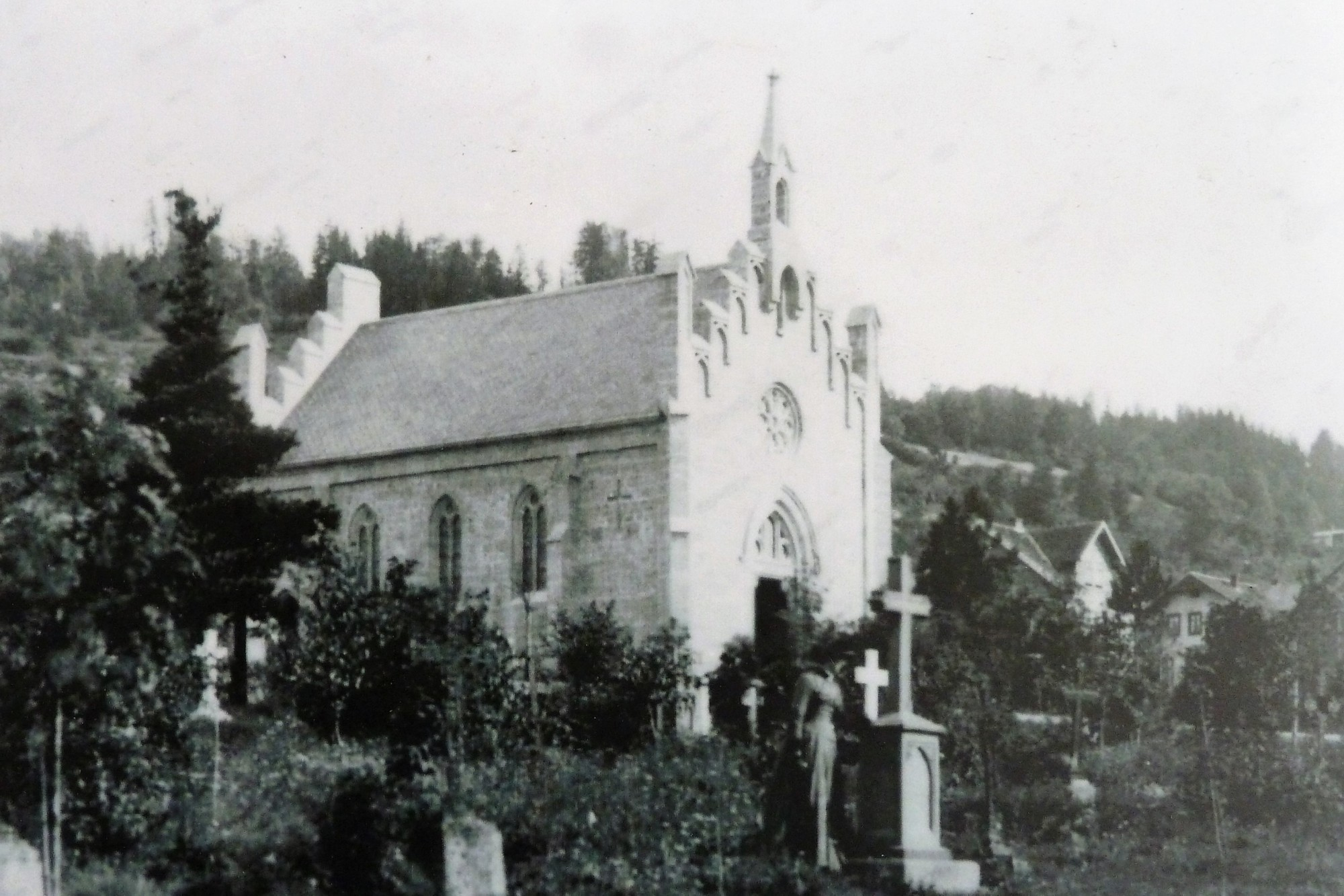 Friedhofkapelle auf dem Parkfriedhof in Meiningen (1885-1945)